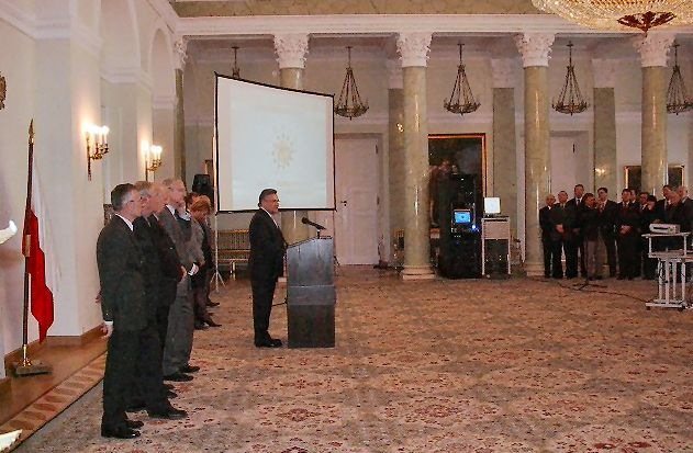 Inauguracja systemu Clusterix w Pałacu Prezydenckim